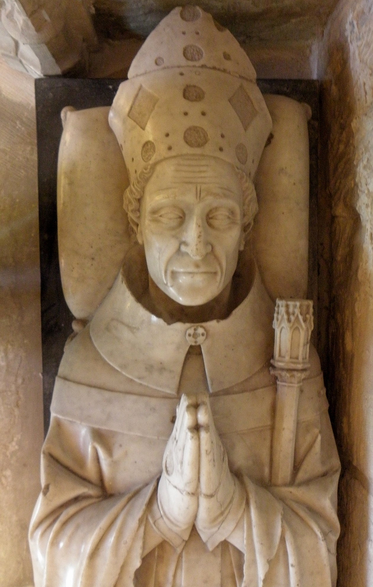 Tombeau de Jean de Marigny en la collégiale Notre-Dame-de-l'Assomption d' Écouis (27).